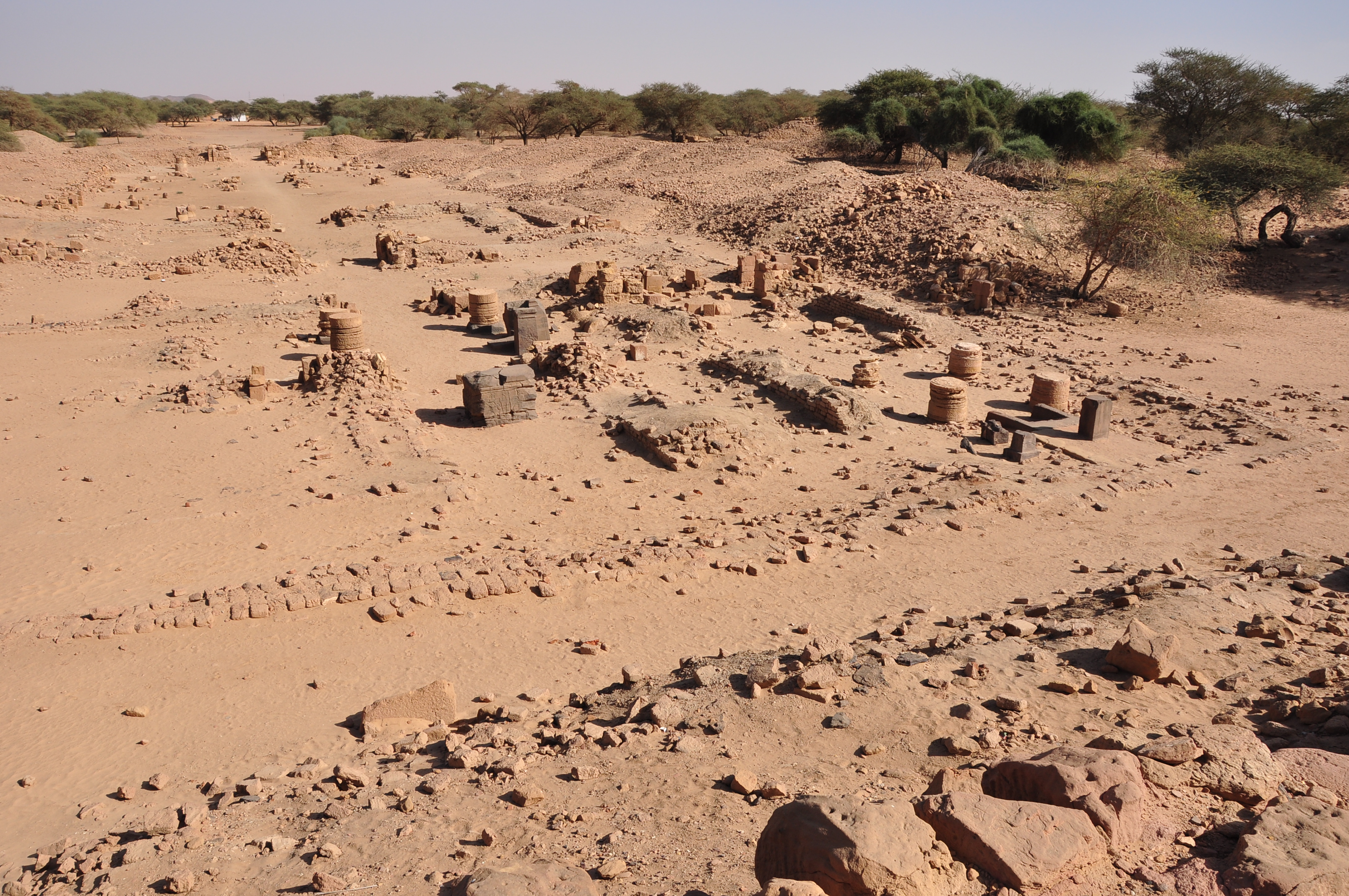 Meroe: Amun-Tempel, Blick westwärts zum Eingang